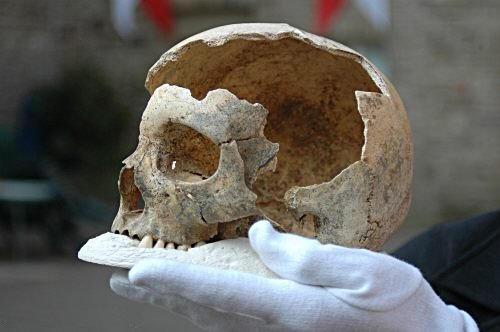 Schädel einer Steinzeitfrau (ca. 5600 Jahre alt), gefunden in der Blätterhöhle bei Hagen in Westfalen